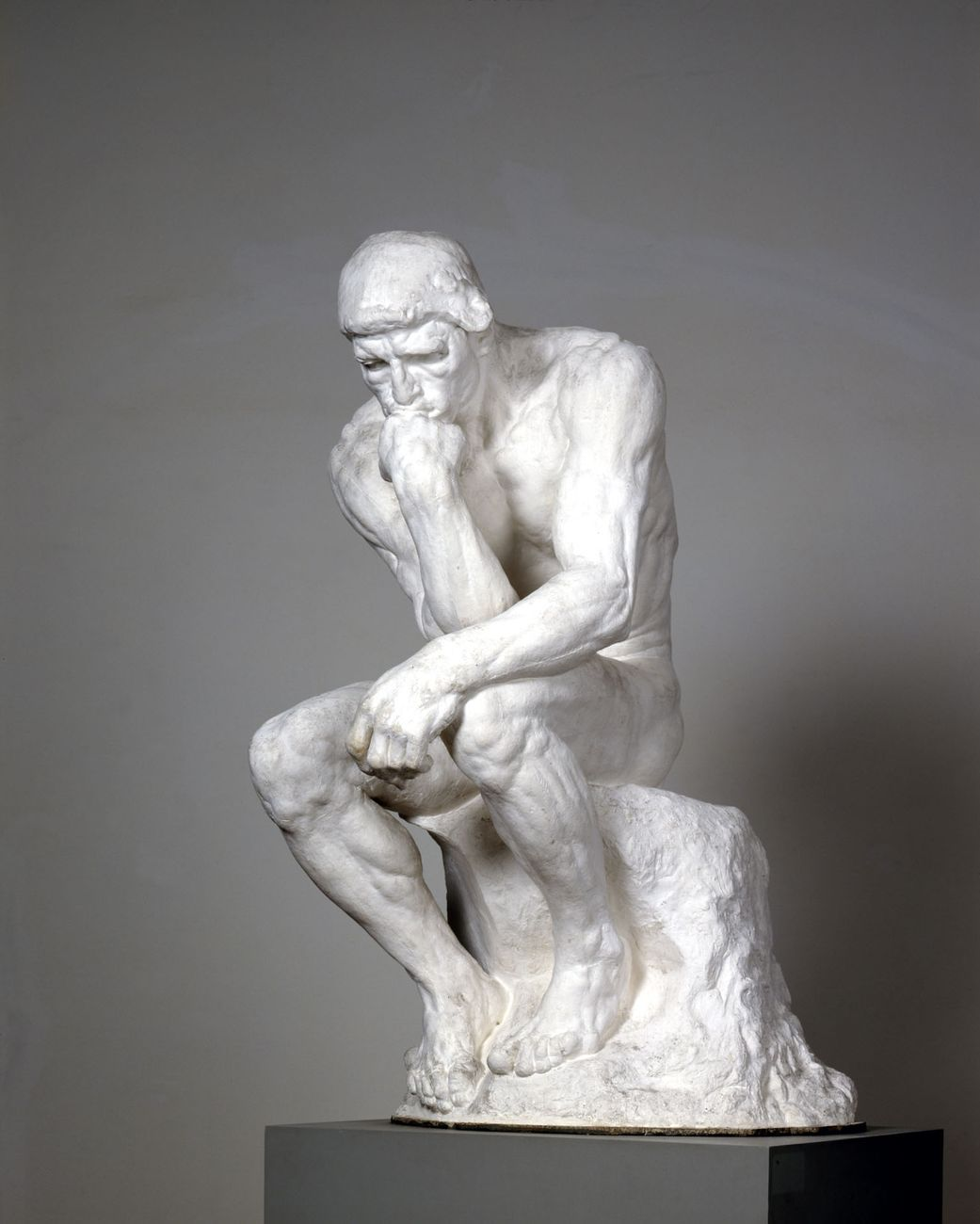 Der Denker; Gips; Höhe 183,5cm; Breite 97 cm; 148cm